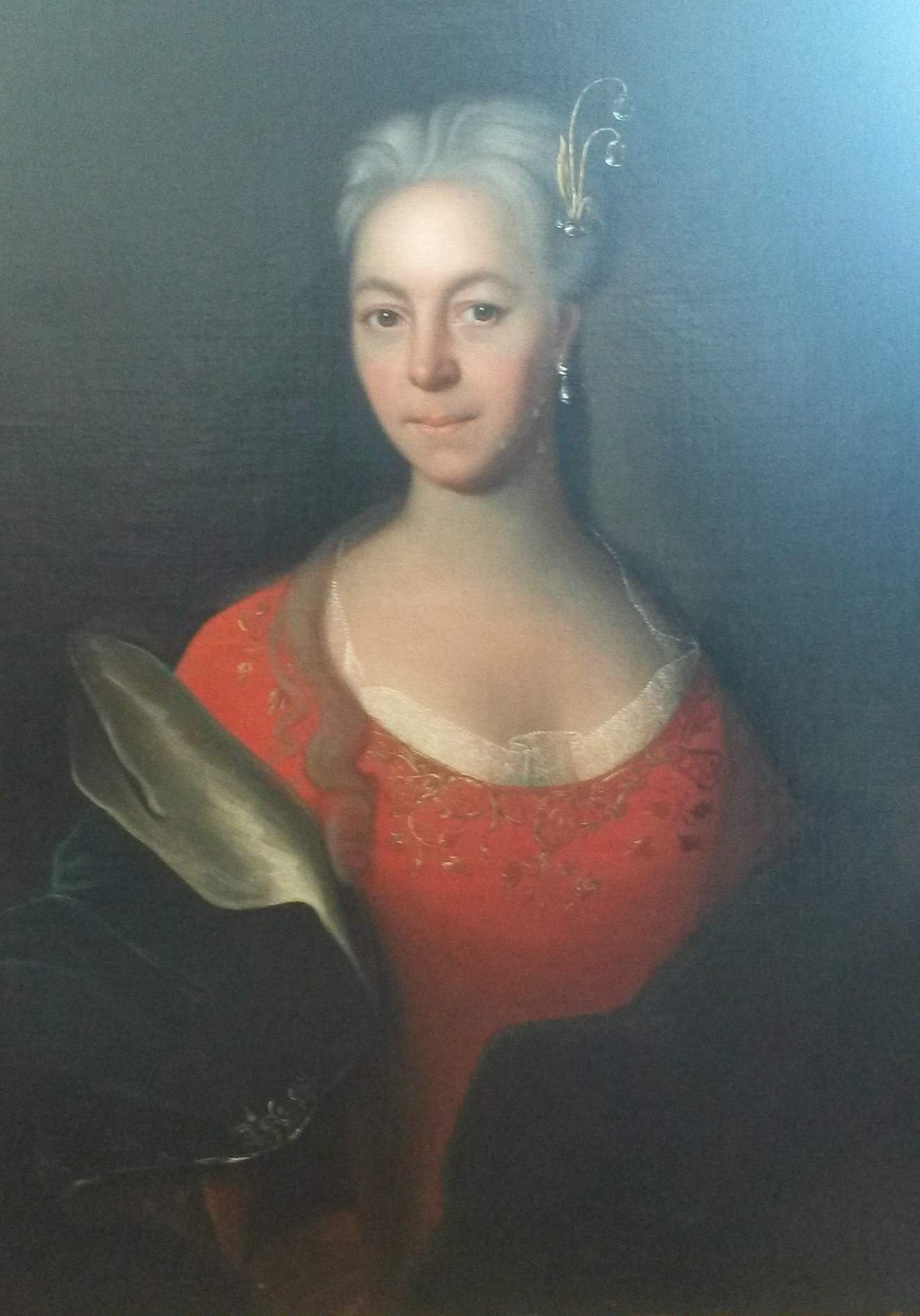 Portrait der Ambrosina Maria Vrints von Treuenfeld geb. Booms, Gemälde in Privatbesitz in Poysdorf